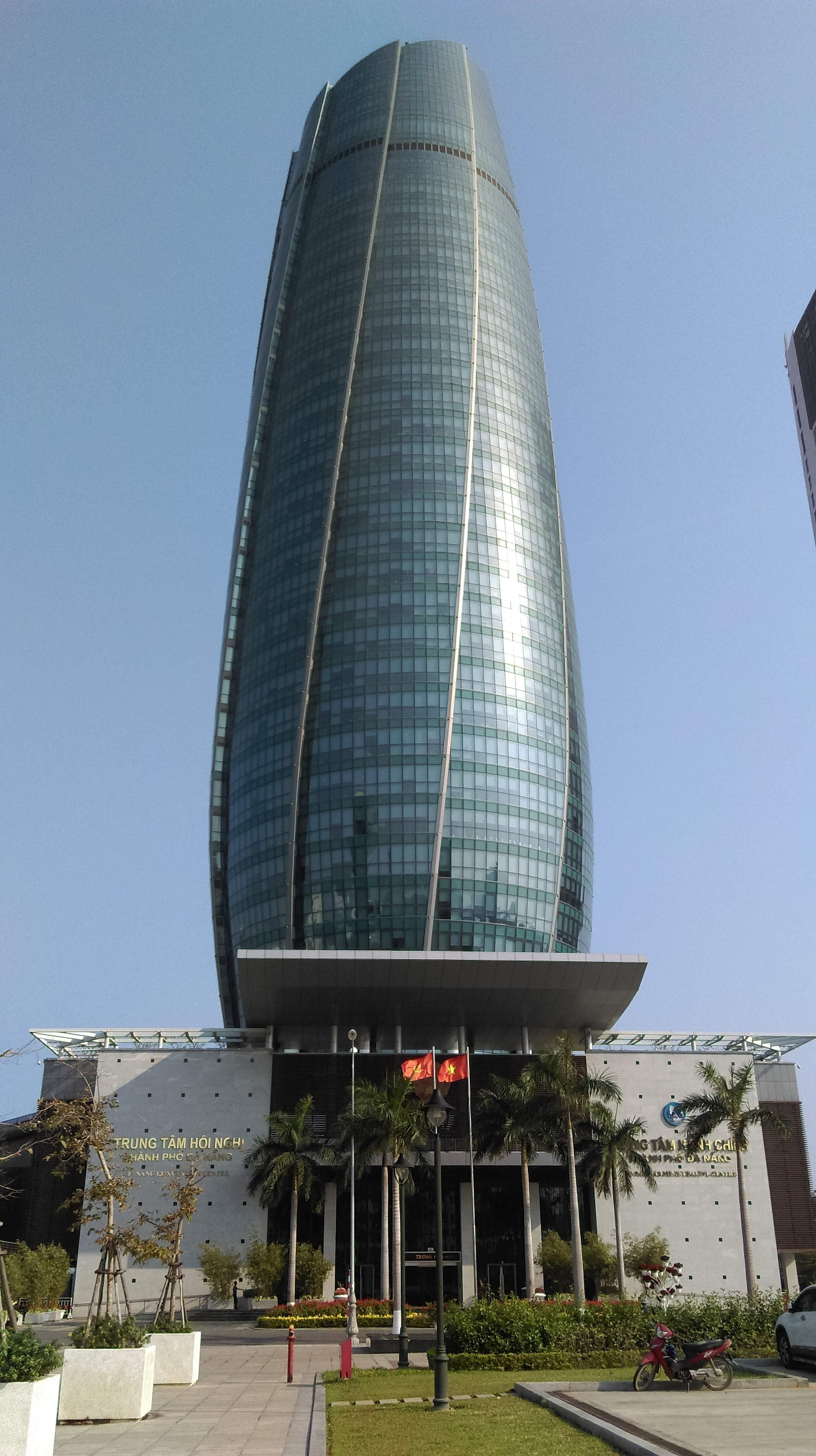 Trung tâm Hành chính Đà Nẵng